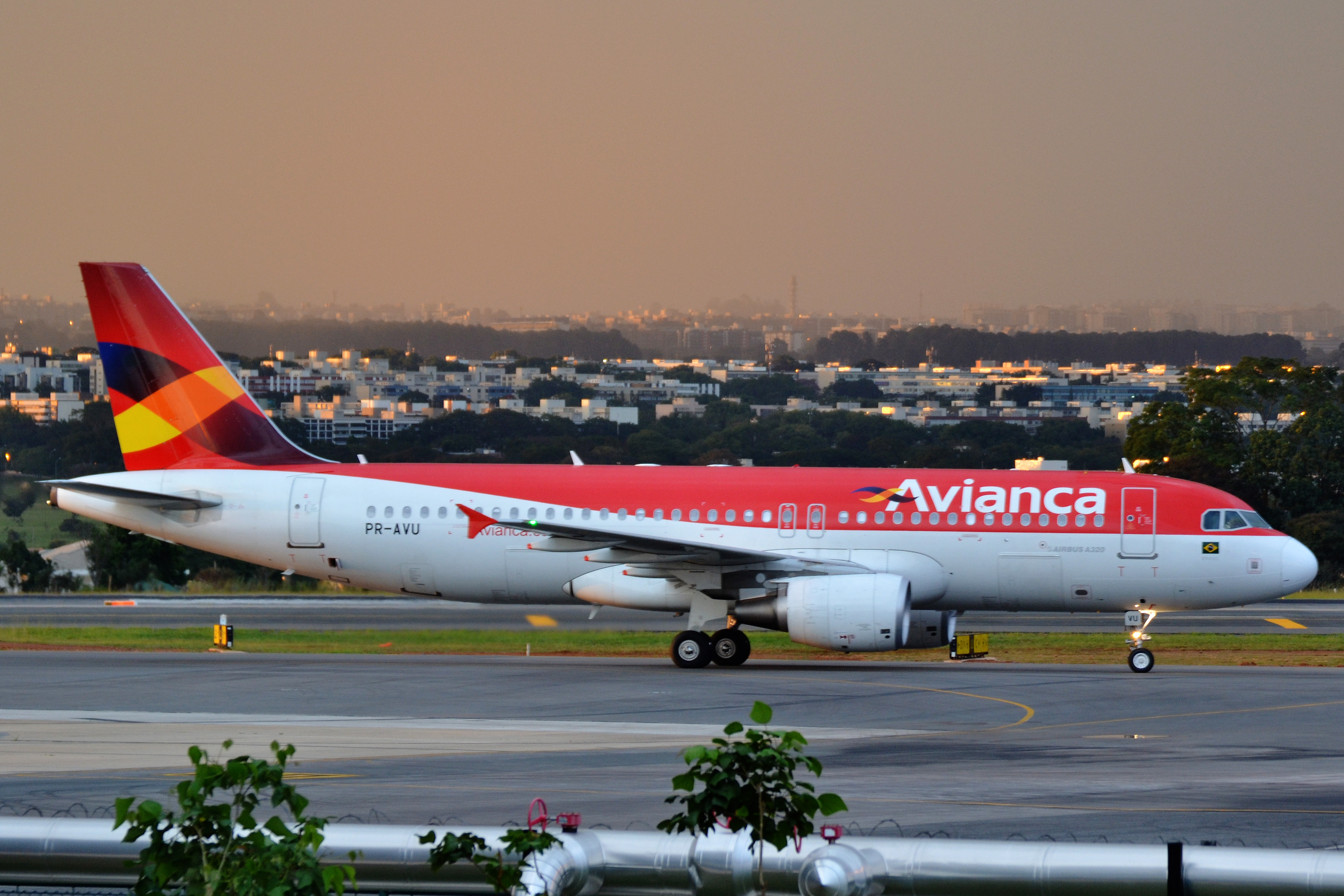 Avianca Brasil Airbus A320-214